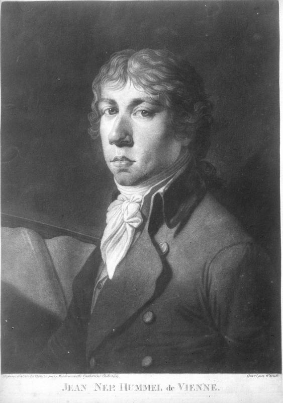 Brustbild Johann Nepomuk Hummel in jüngeren Jahren. Nach ad-vivum-Zeichnung von Katharina Escherich.